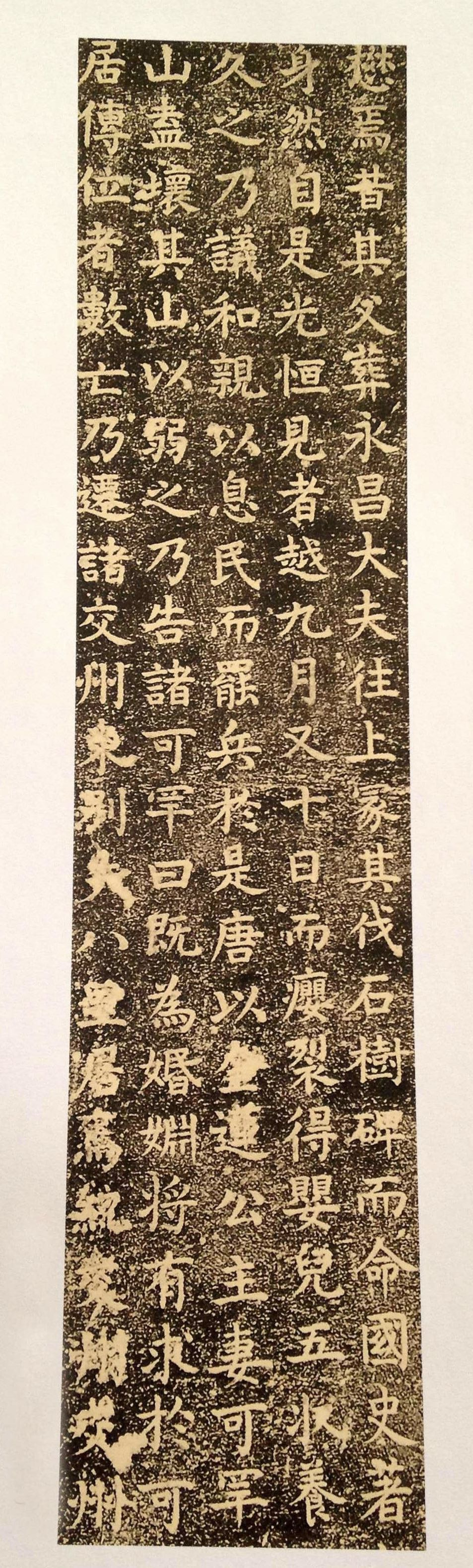 元文宗至顺二年（1331年），由虞集撰文，巎巎书丹，赵世延篆额的亦都护高昌王世勋残碑（汉文部分）